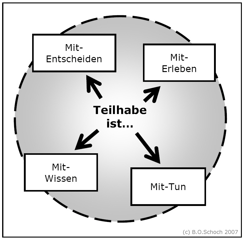 Dimensionen von Teilhabe/Partizipation; Lebensweltorientierung; Lebensweltorientierte Soziale Arbeit; Kinder- und Jugendhilfe; Hans Thiersc